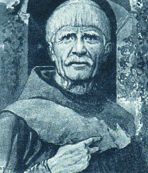 Fra Lovro Karaula.